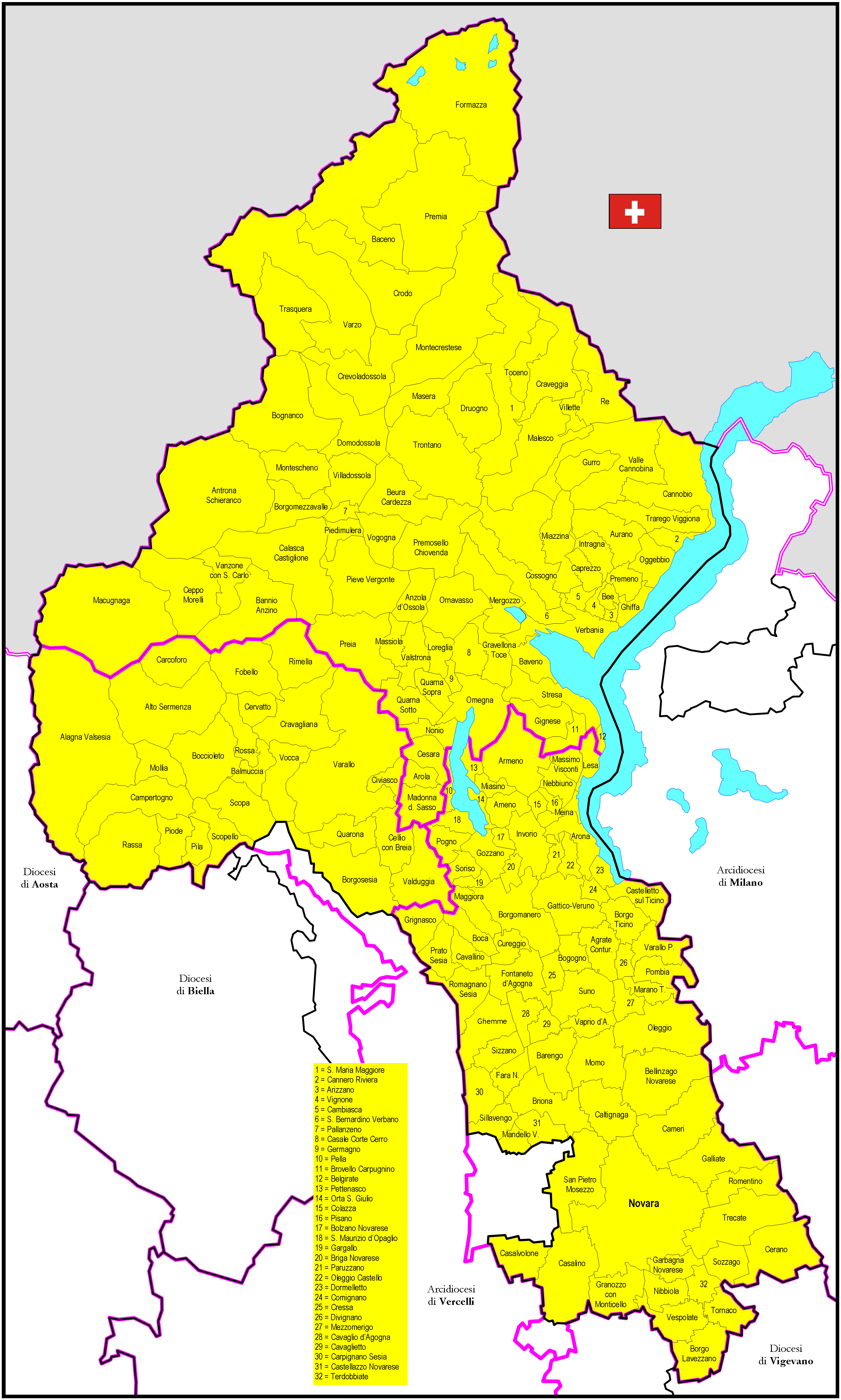 Mappa della Diocesi di Novara (Italia)